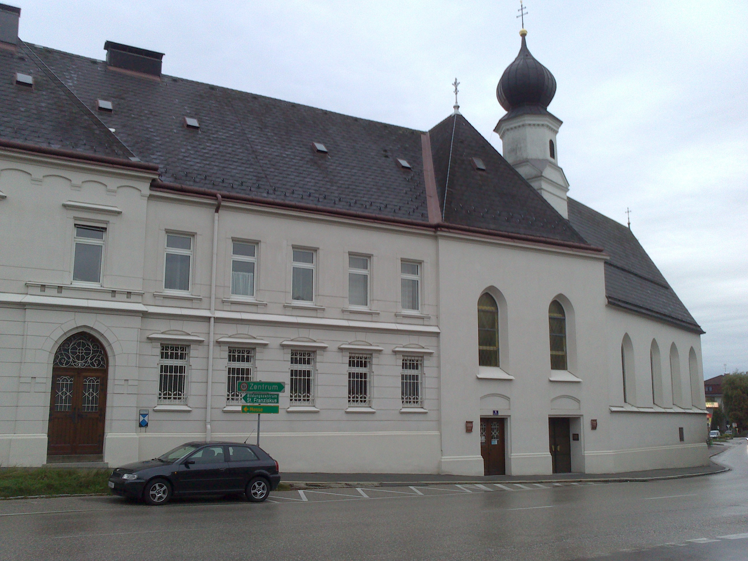 Redemptoristinnenkloster St. Anna und Kirche